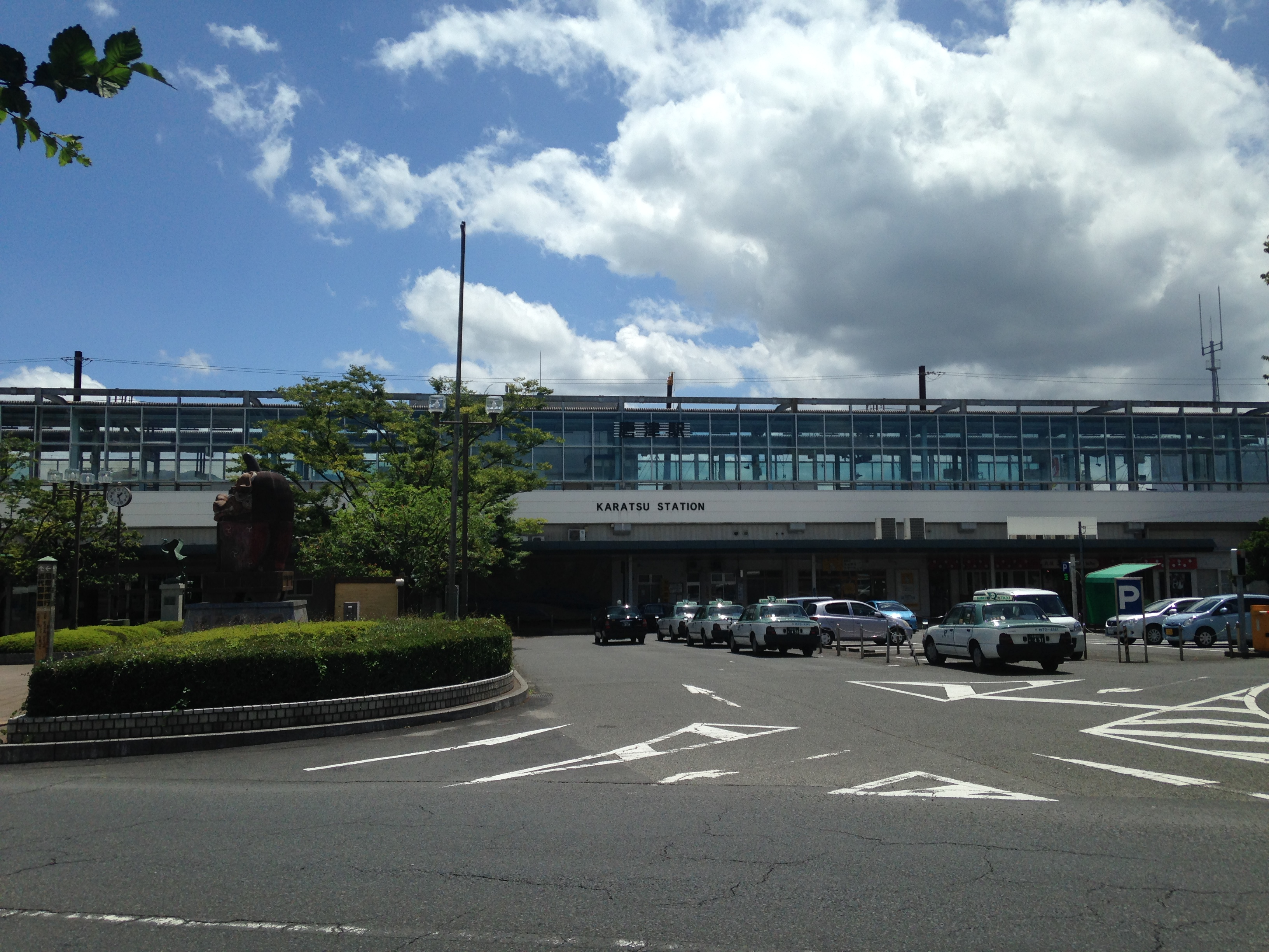 唐津駅北口の眺め